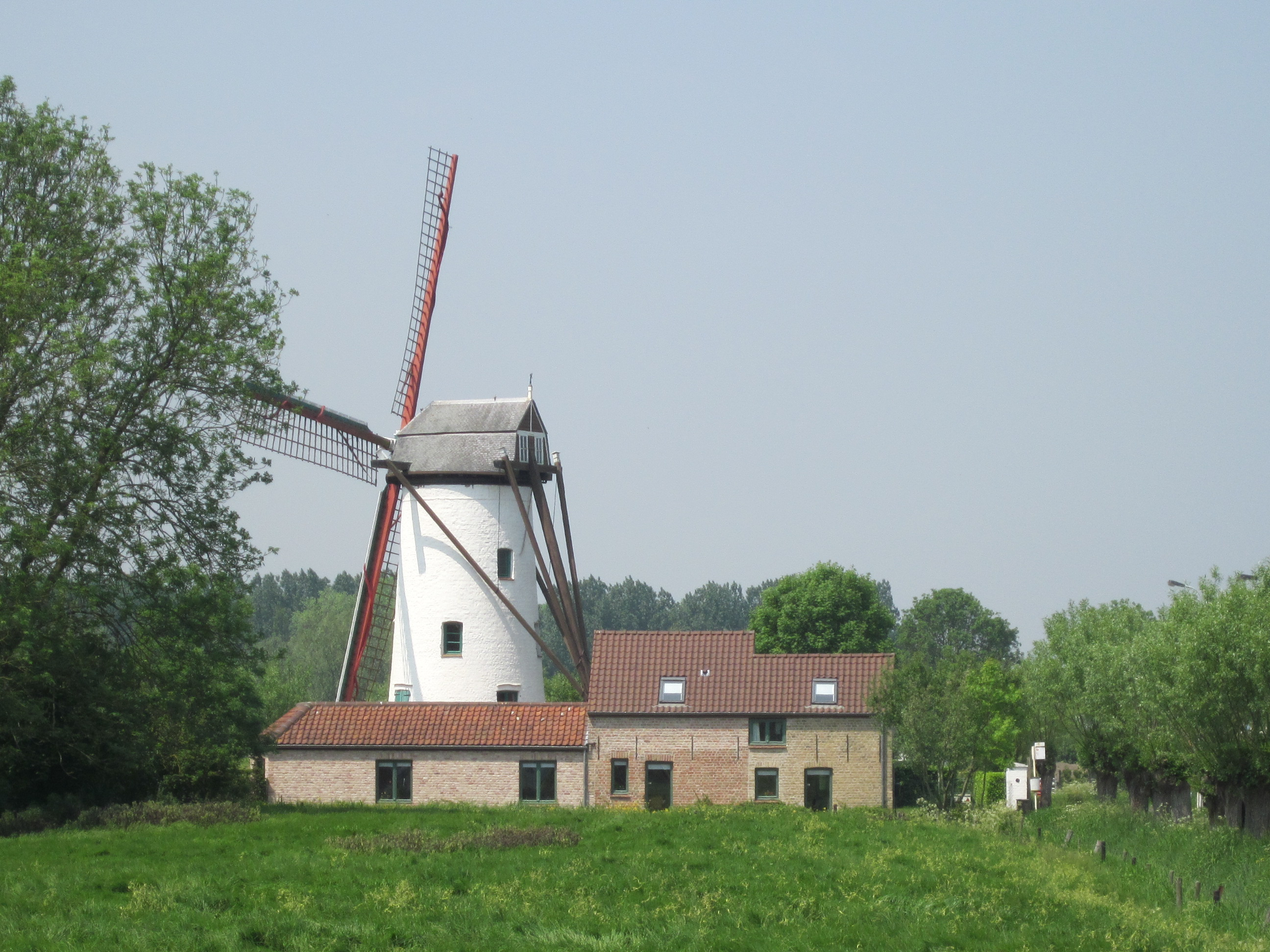 Molen van Hoeke, Damme 47″ N, 3° 19′ 53.51″ E